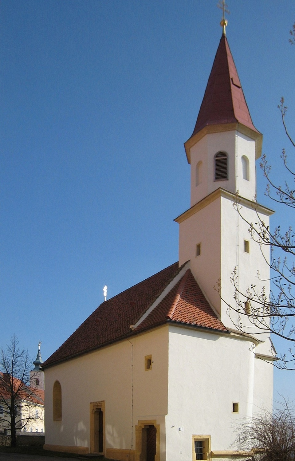 Kath. Filialkirchehl. Sebastian